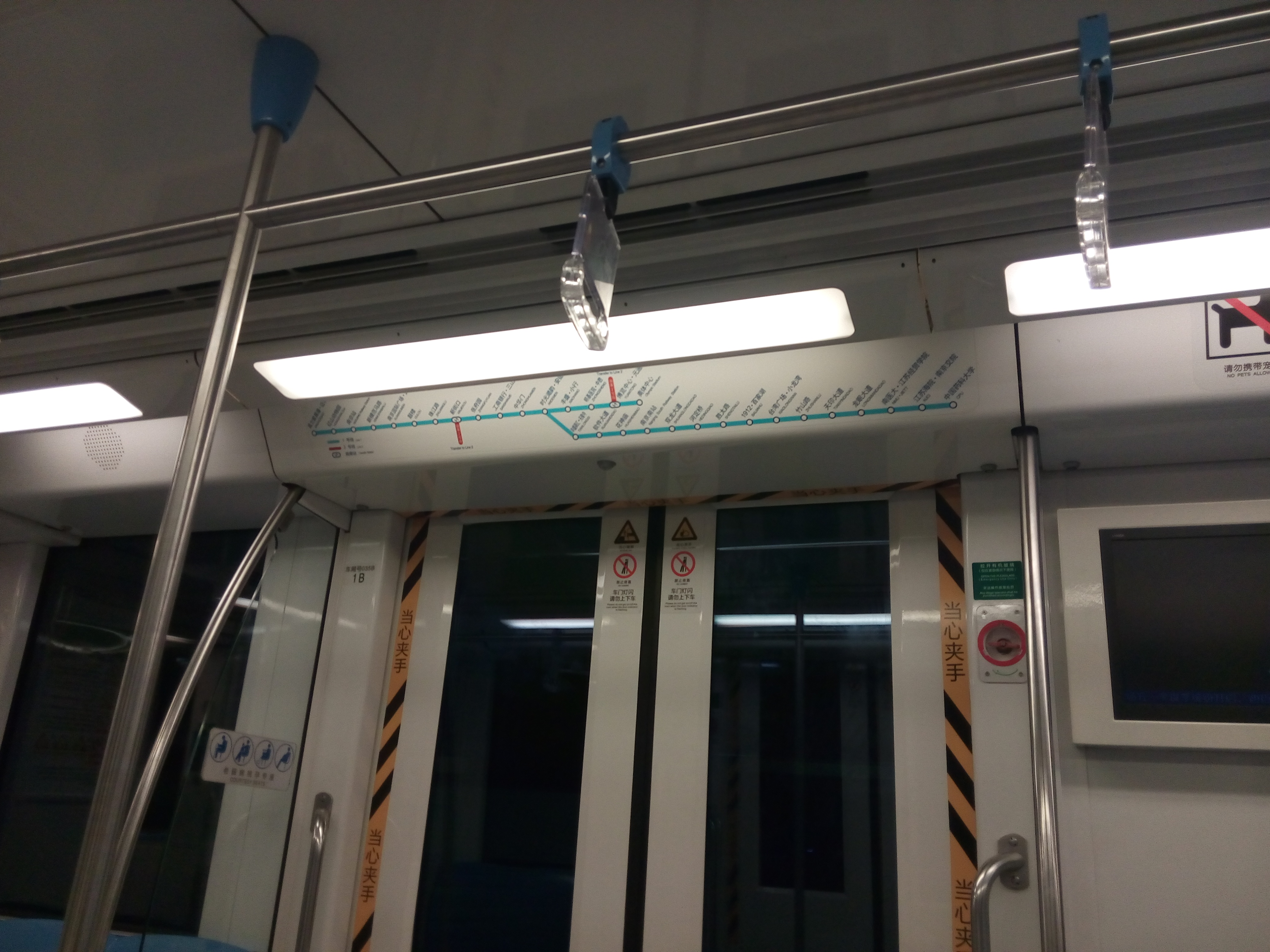 一号线内部线路图